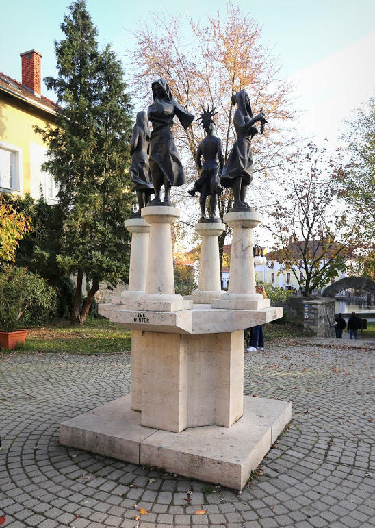 Marton László Négy évszak szobor Tapolcán a Malomtónál